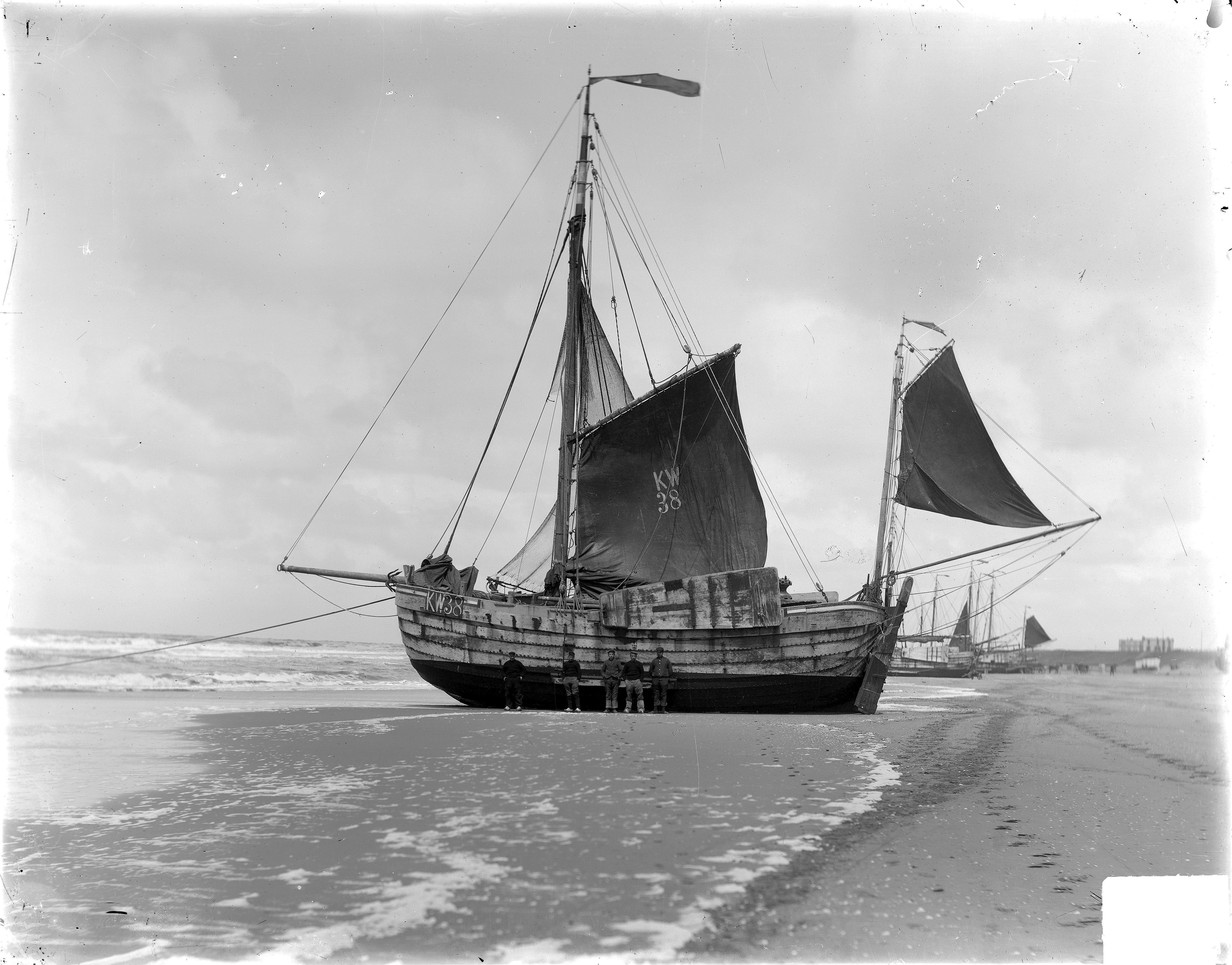 Gezicht op het strand van Katwijk aan Zee, met bomschuit KW38, met gehesen zeilen.